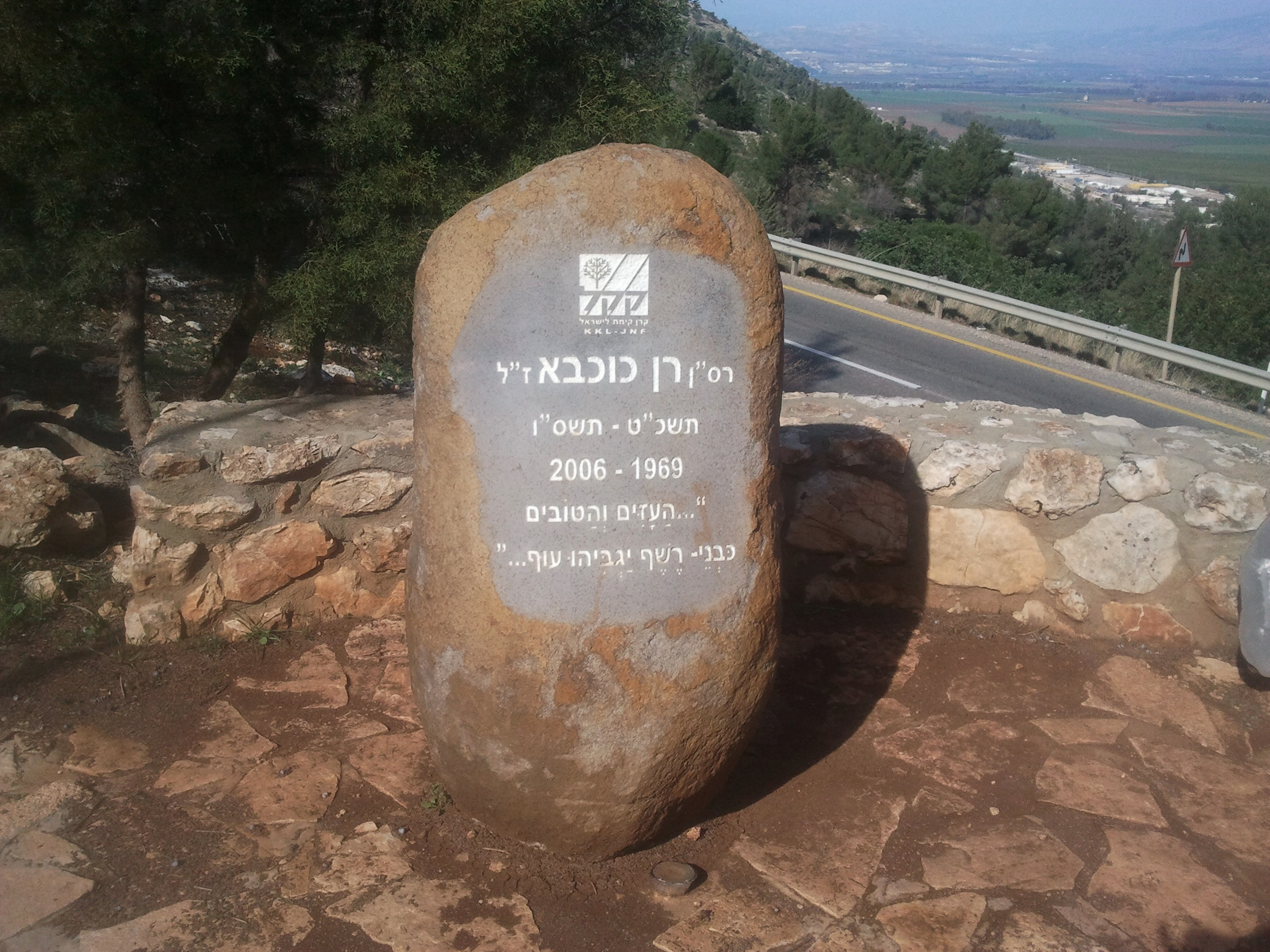 מצפה רן, הוא נקודת תצפית ואתר זיכרון לזכרו של הטייס רס"ן רן כוכבא שנפל עם מסוקו במהלך מלחמת לבנון השנייה ליד כביש 899 המוביל למצודת כוח ברכס הרי נפתלי הדרך לנקודת הנפילה הוא שביל חידות הכולל 7 חידות הקשורות למקום והפתרון להם מנקודת התצפית ניתן לצפות לעבר עמק החולה ורמת הגולן